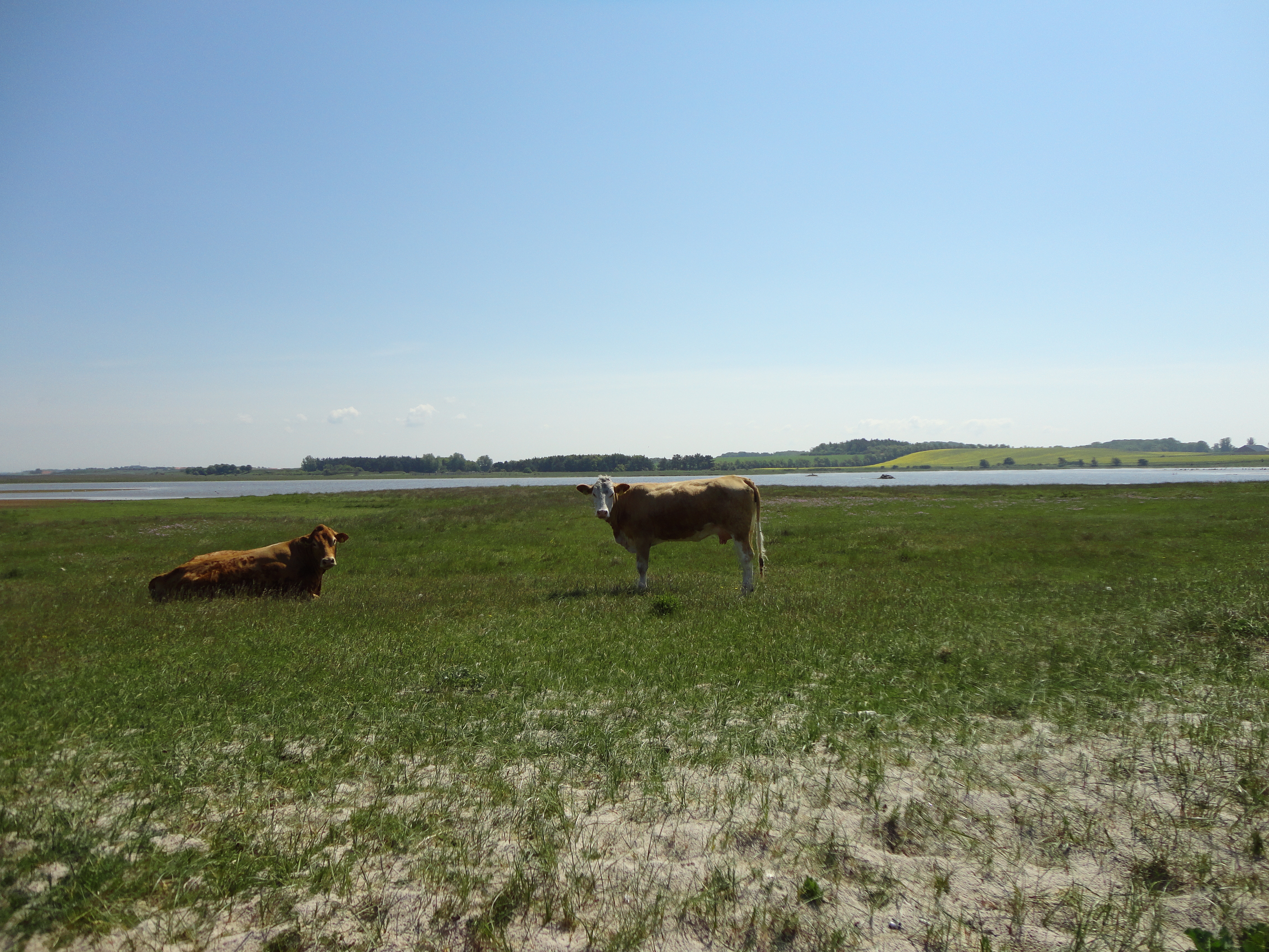 Græsning på Lejodde